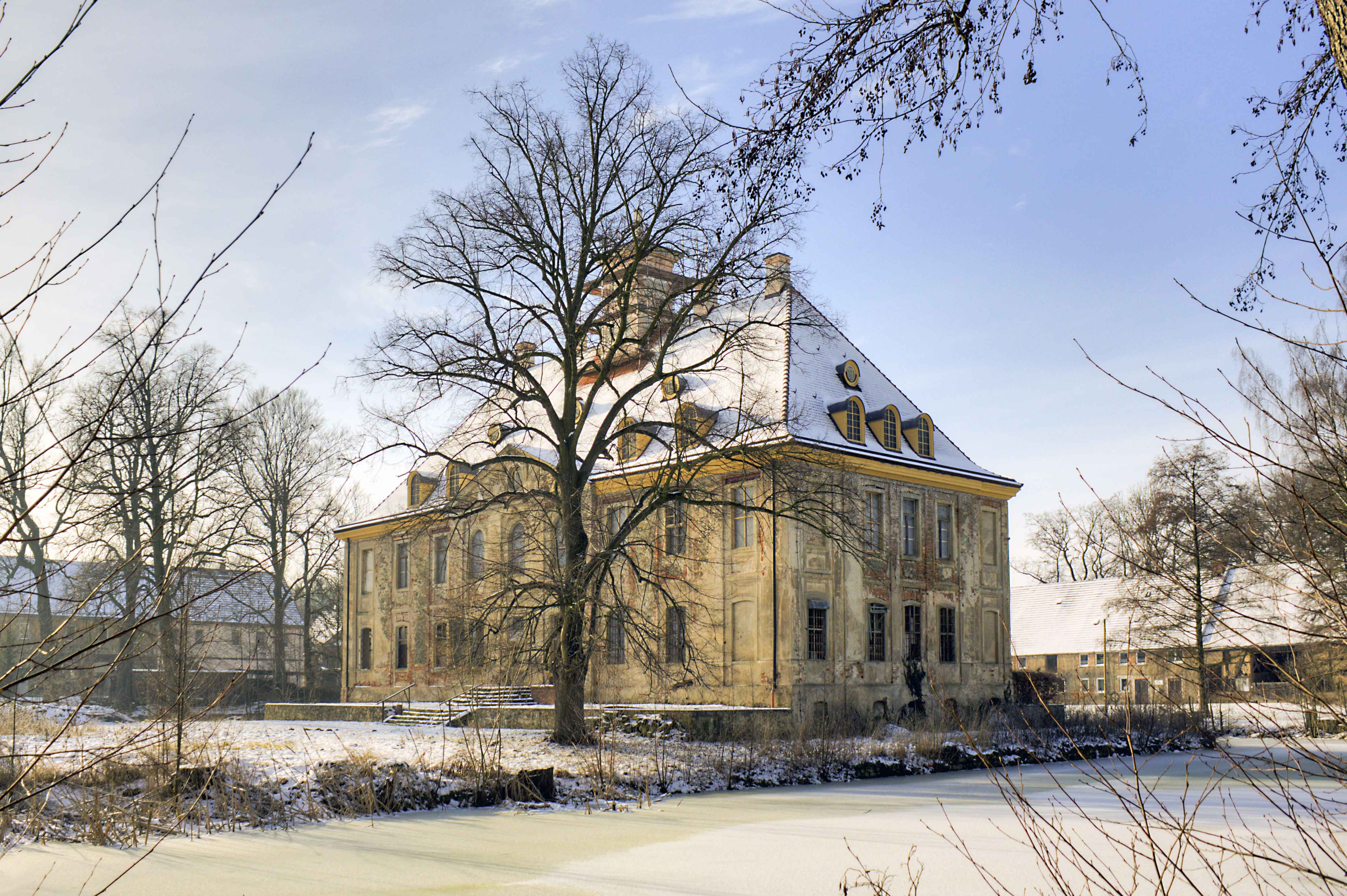 Schloss Leuben